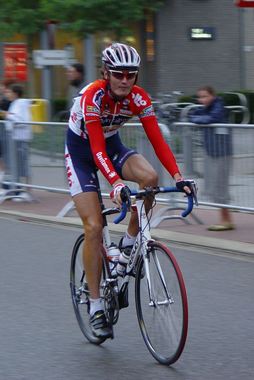 Johan Vansummeren in het na-Tour creterium van Lommel 2006